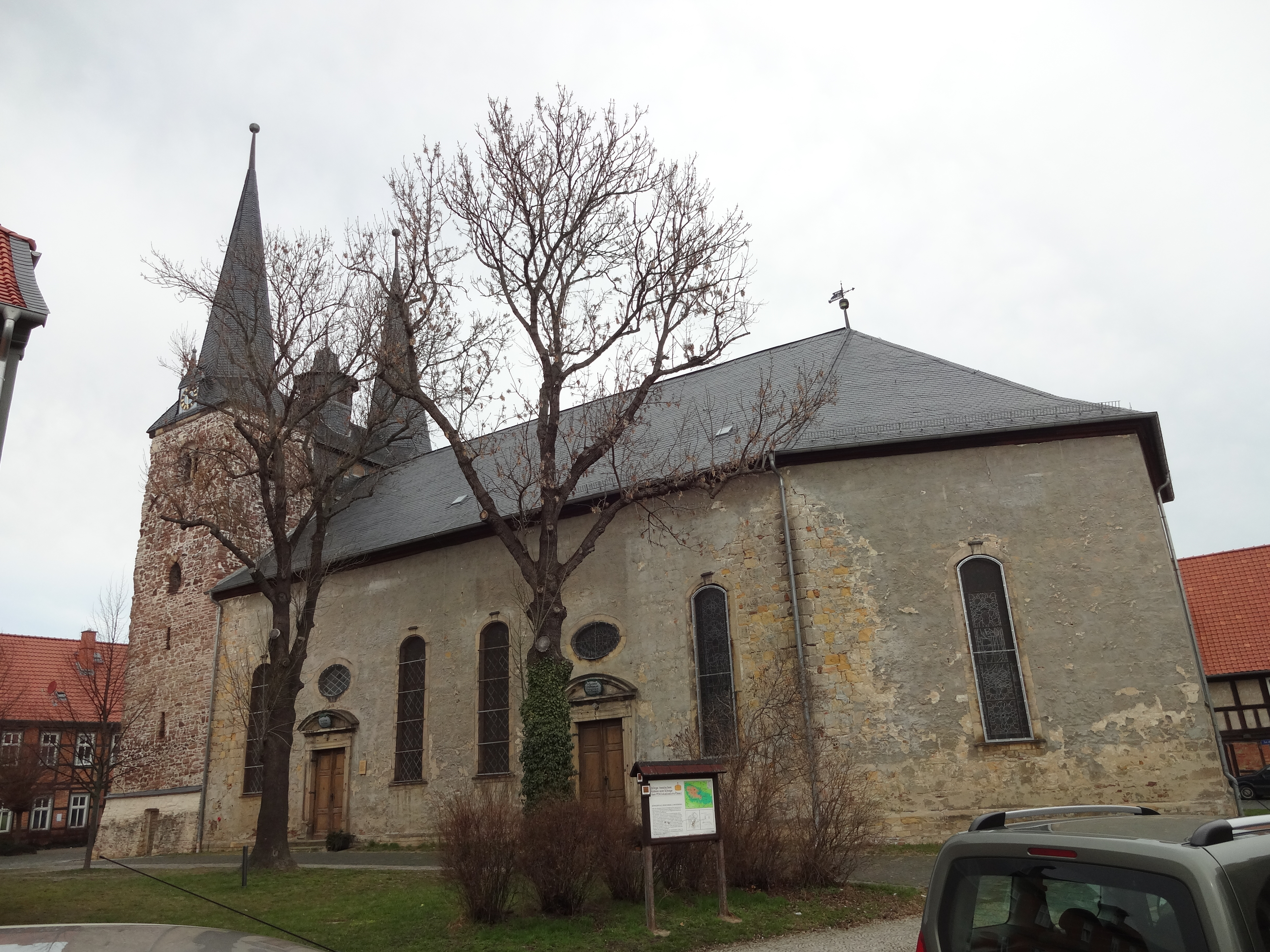 denkmalgeschützte Kirche in Derenburg, Ortsteil von Blankenburg (Harz)